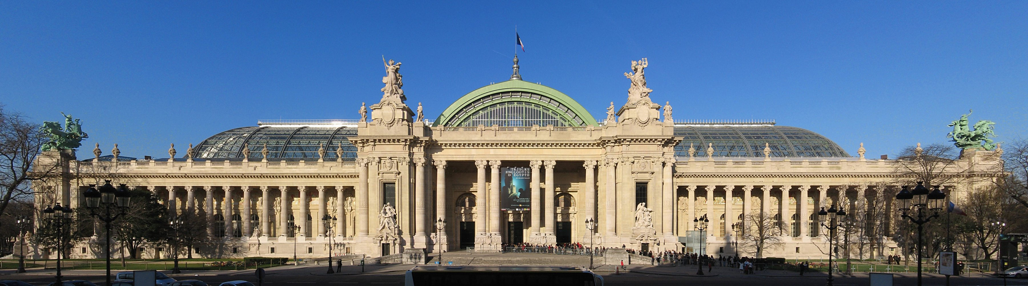 Panoramique Grand Palais à Paris